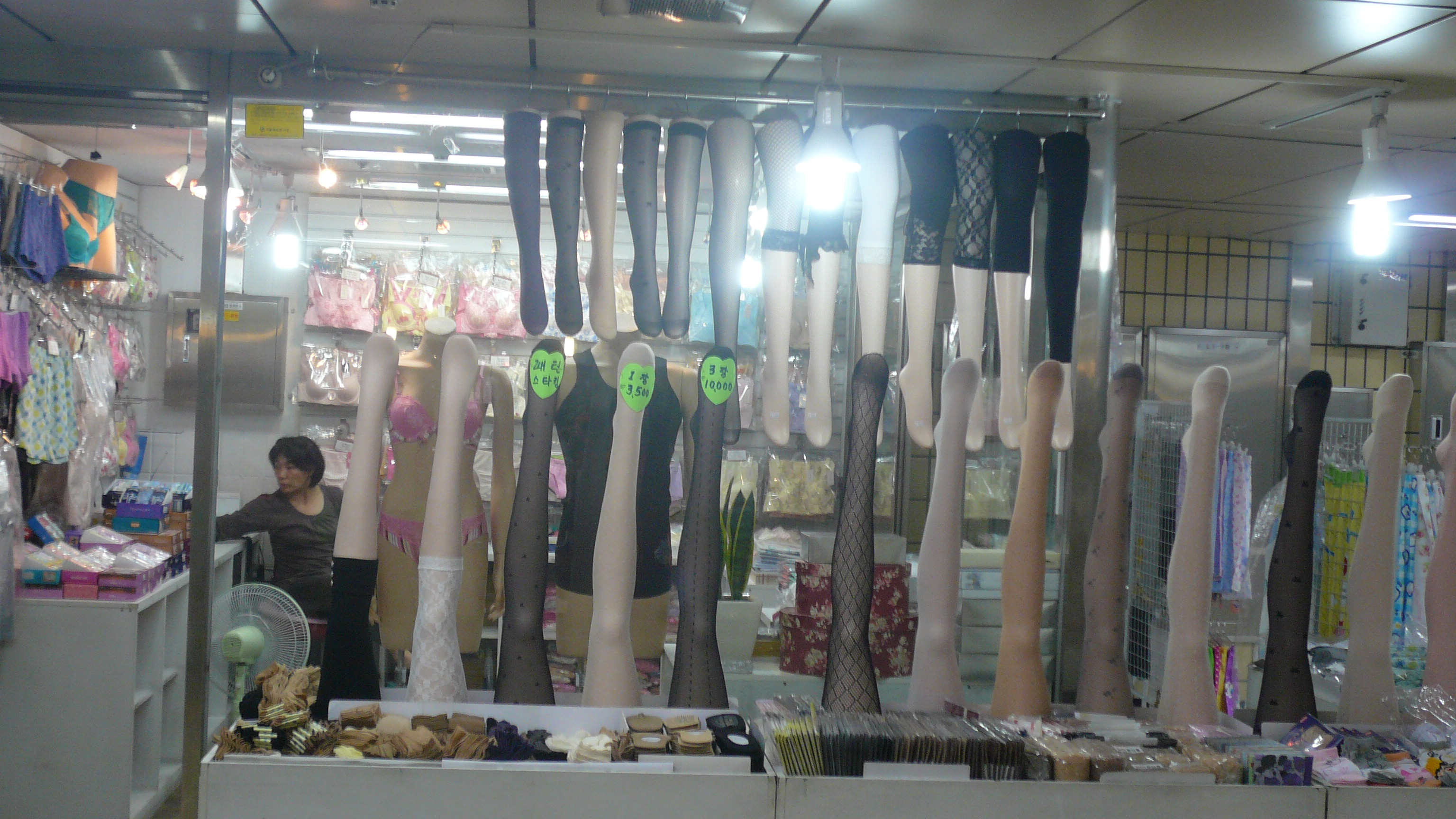 stockings for sale in south korea